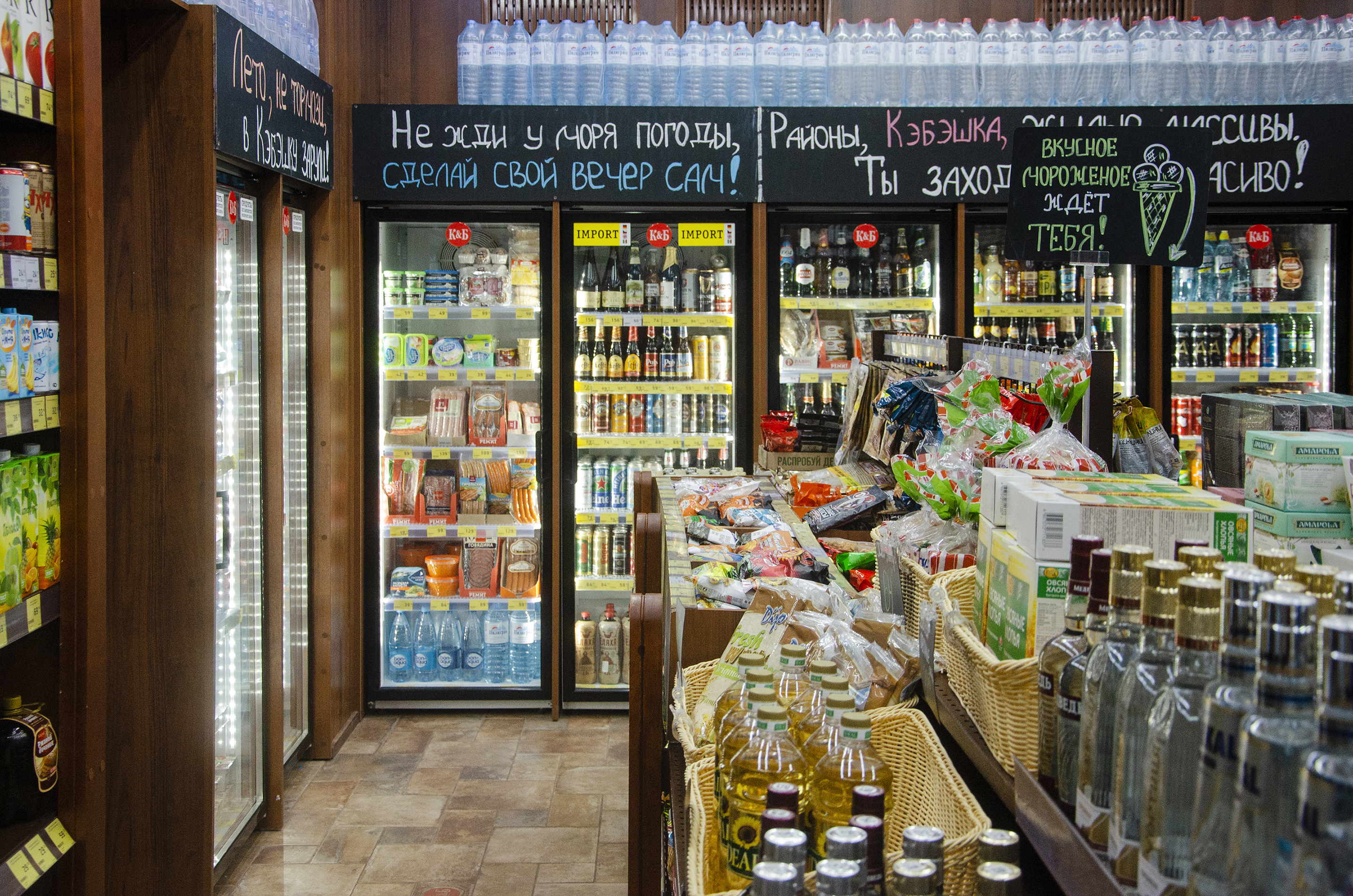 Интерьера магазина сети "Красное & Белое" в Челябинске